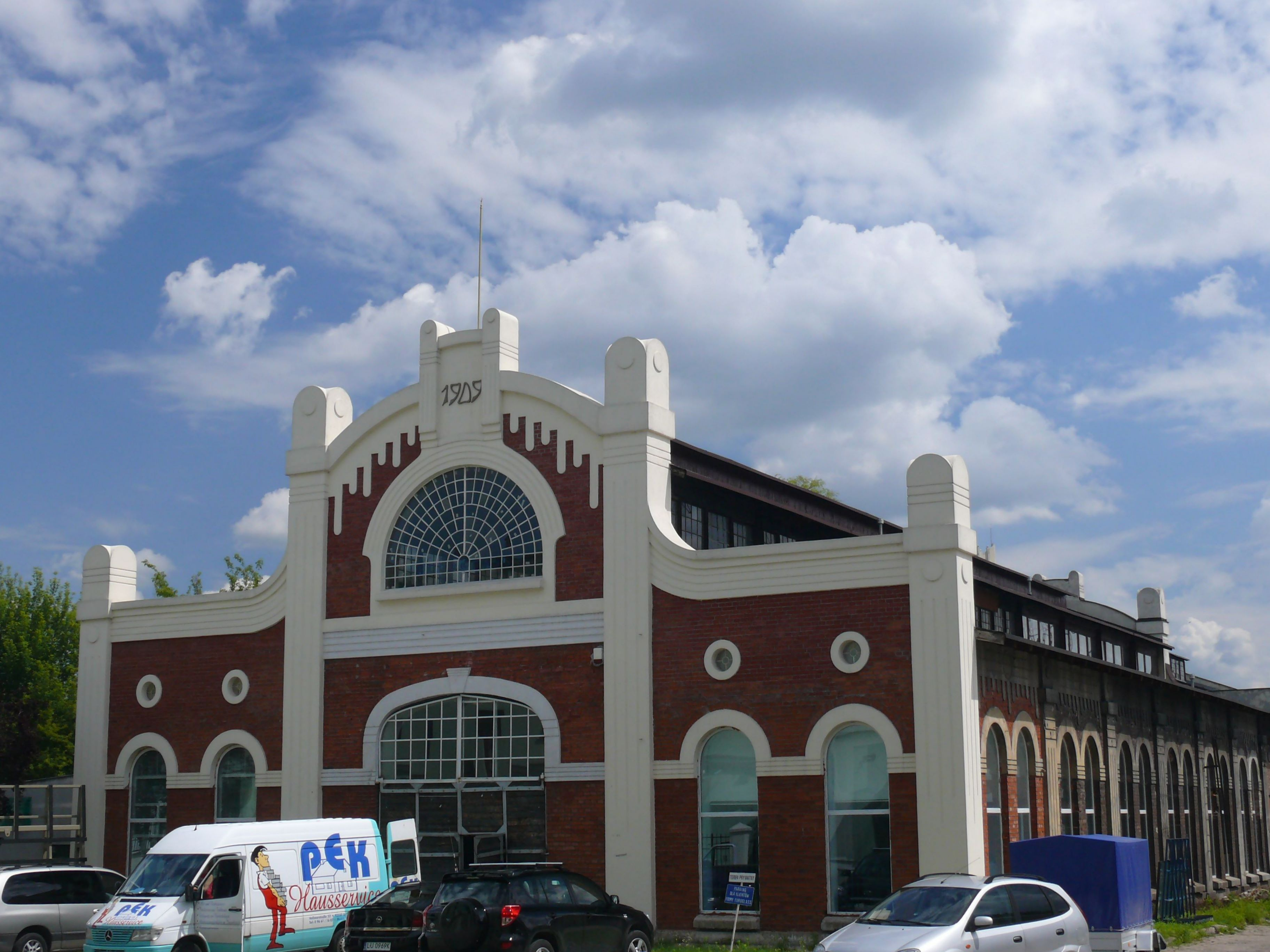 Lublin - Odnowiona hala fabryczna na terenie przedwojennej Fabryki Maszyn Rolniczych "Wolski i S-ka" w Lublinie